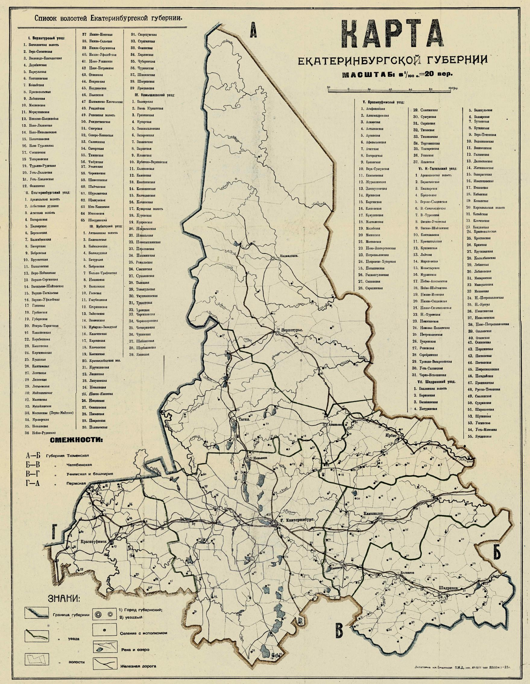 Карта Екатеринбургской губернии 1923 года. Екатеринбургская типо-литография им. А. И. Емшанова